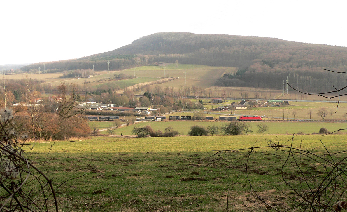 Deisterpforte